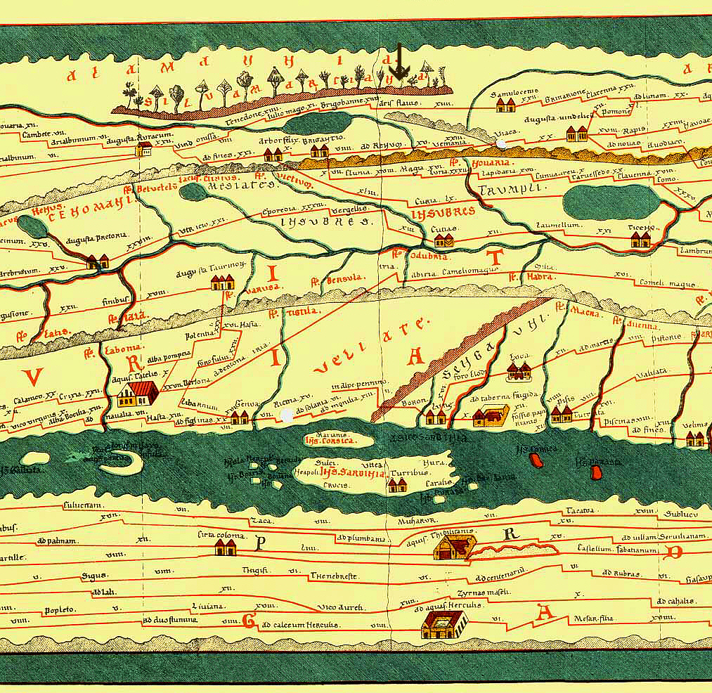 Ausschnitt aus der Tabula Peutingeriana mit Rottweil (Arae Flaviae) als ARIS FLAVIO (Pfeil oben Mitte)